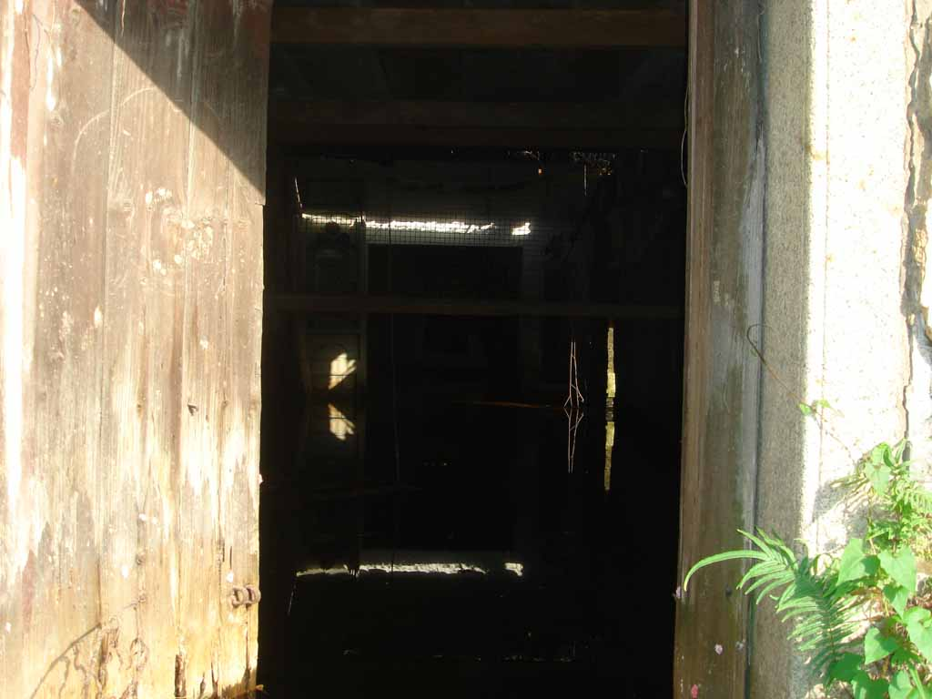 中文（香港）: 慰寂祠內貌（己水浸）。